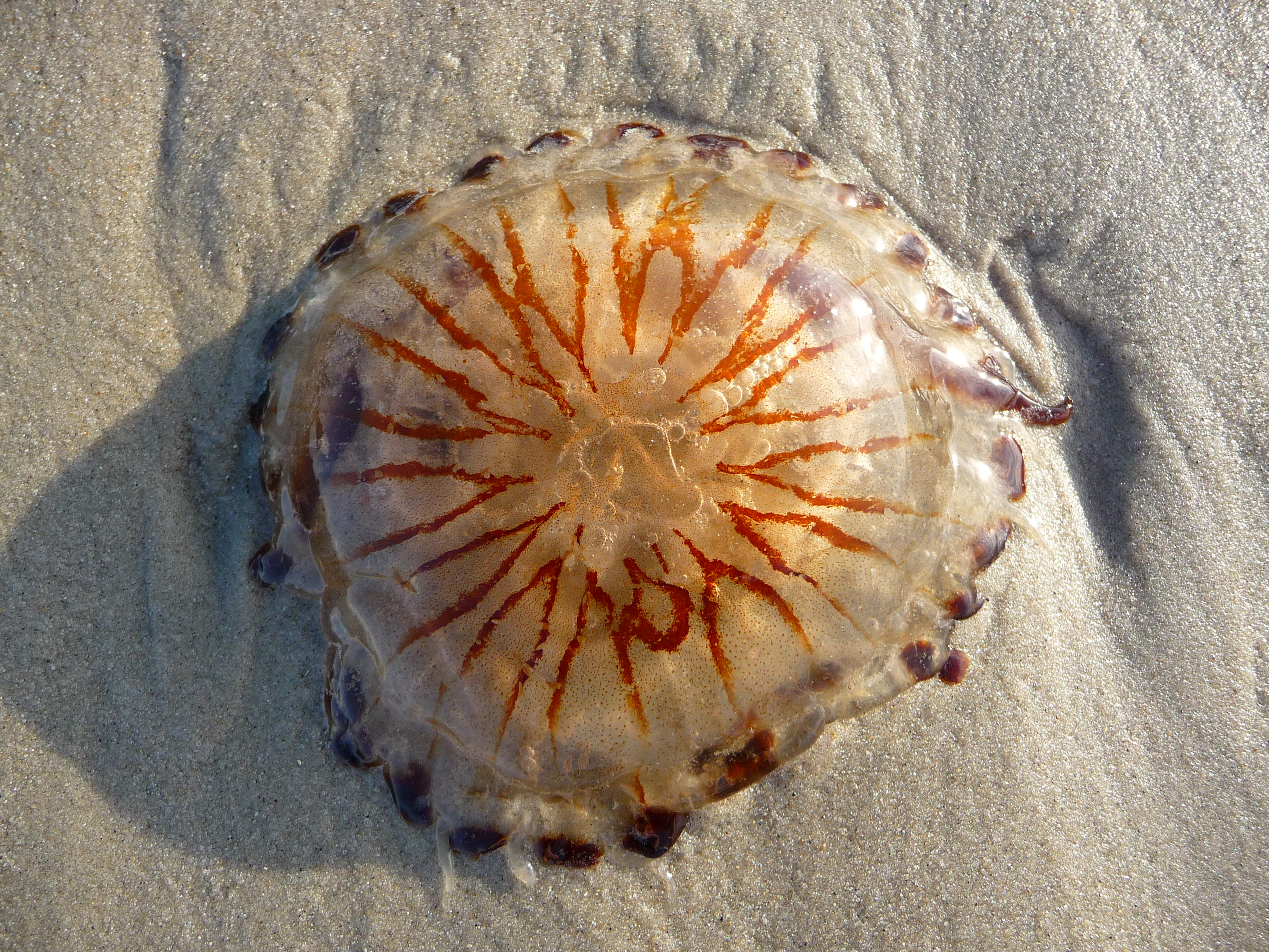 Kompaßqualle (Chrysaora hysoscella) im Spülsaum der Nordsee, aufgenommen auf der ostfriesischen Nordseeinsel Juist (Niedersachsen, Deutschland)